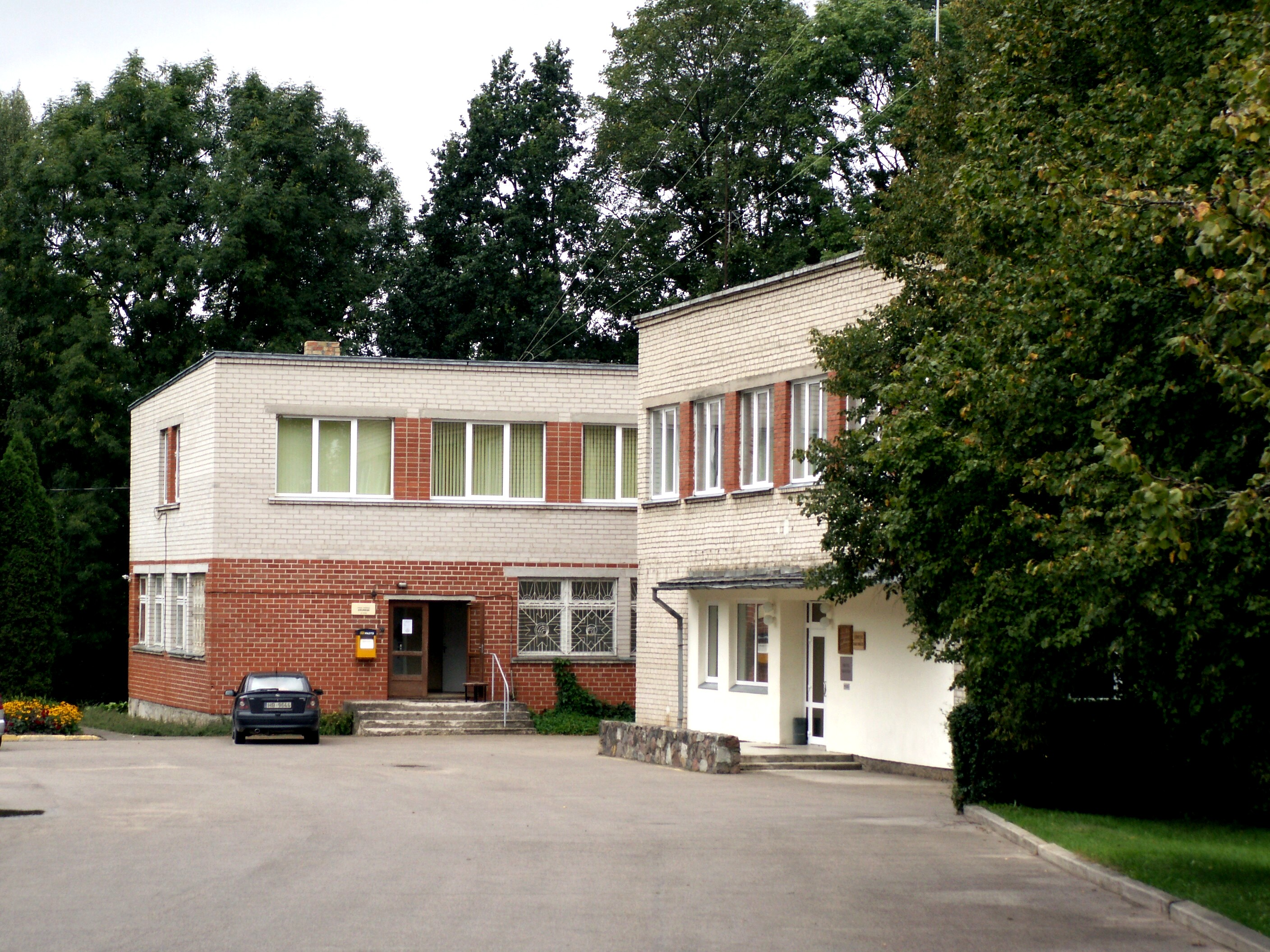 Zelmeniai, Tervetės savivaldybės ir pagasto centras, Latvija